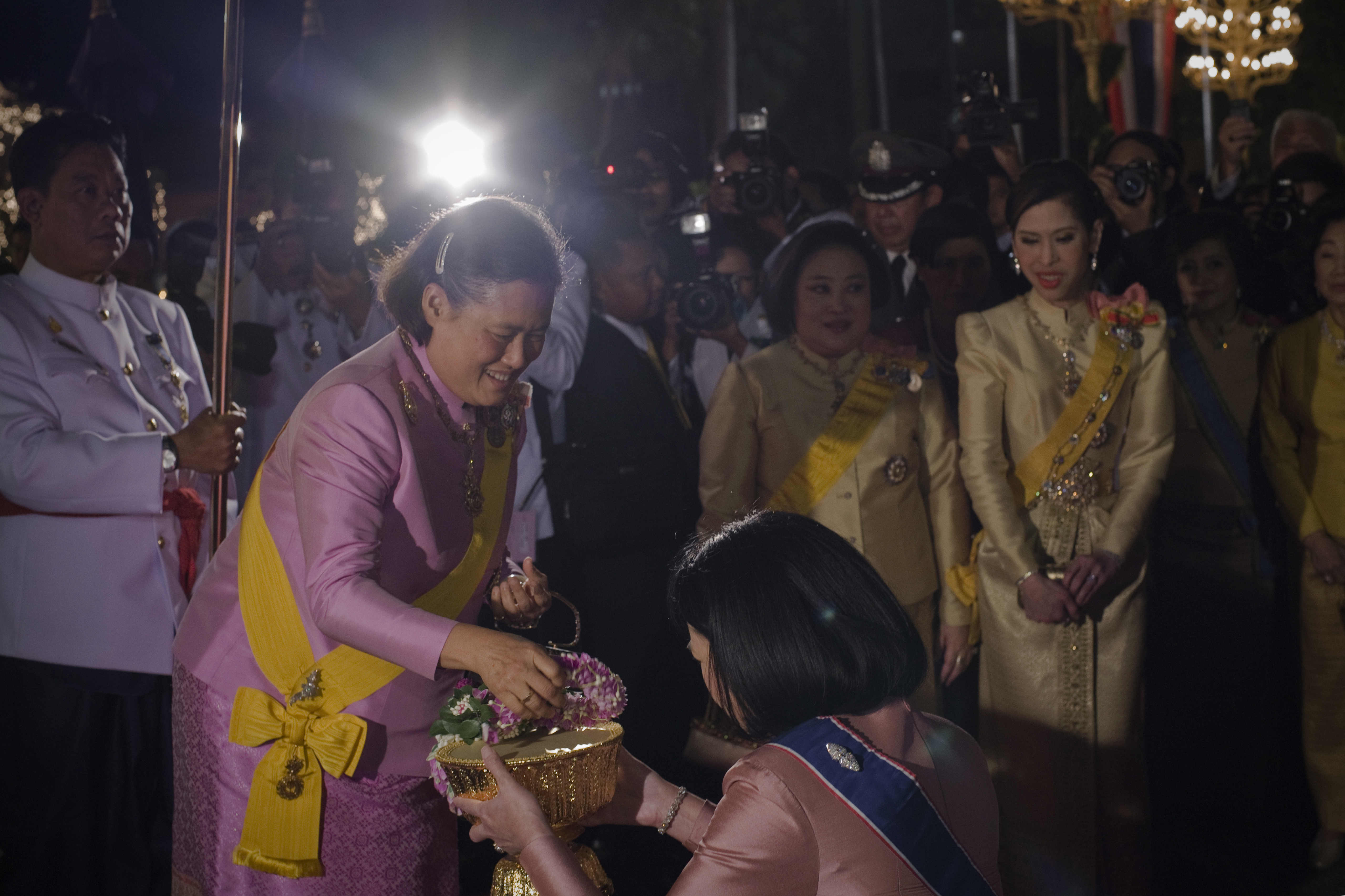 นายกรัฐมนตรี และภริยา เฝ้าฯ รับเสด็จ สมเด็จพระเทพรัตนราชสุดาฯ สยามบรมราชกุมารี เสด็จพระราชดำเนินพร้อมด้วยพระบรมวงศานุวงศ์ในงานสโมสรสันนิบาตเฉลิมพระเกียรติพระบาทสมเด็จพระเจ้าอยู่หัว เนื่องในโอกาสมหามงคลเฉลิม พระเกียรติพระชนมพรรษา วันอังคารที่ 7 ธันวาคม พ.ศ.2553 (Photographer attached to the Prime Minister of the Kingdom of Thailand : Peerapat Wimolrungkarat / พีรพัฒน์ วิมลรังครัตน์) @is50mm